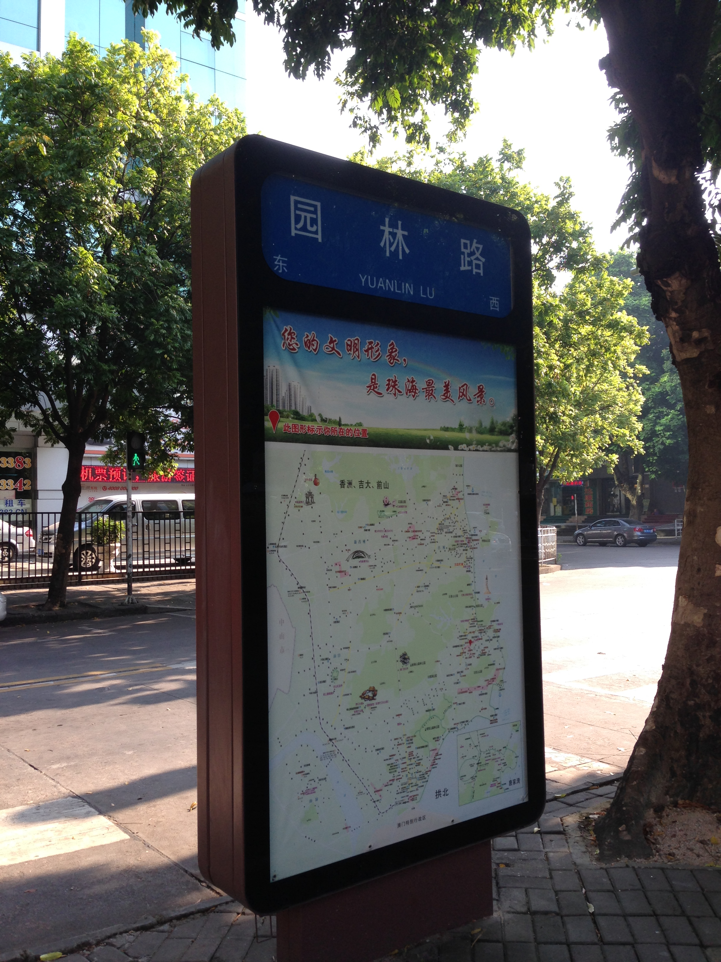 珠海园林路